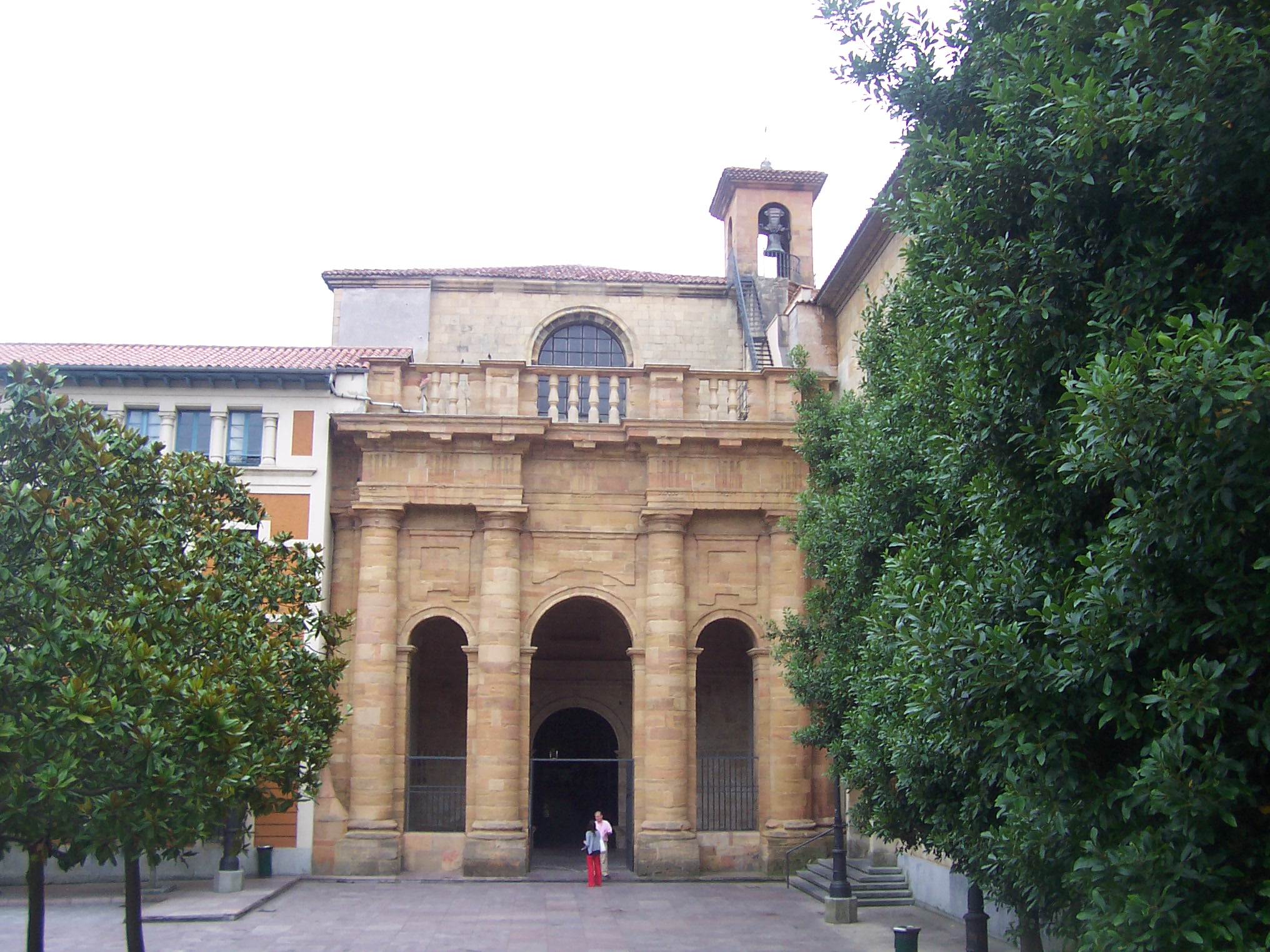 Esta foto participó En Otro Lugar